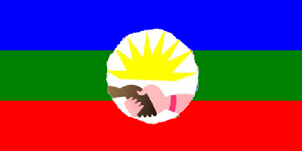 Bandera del Municipio Tucupita